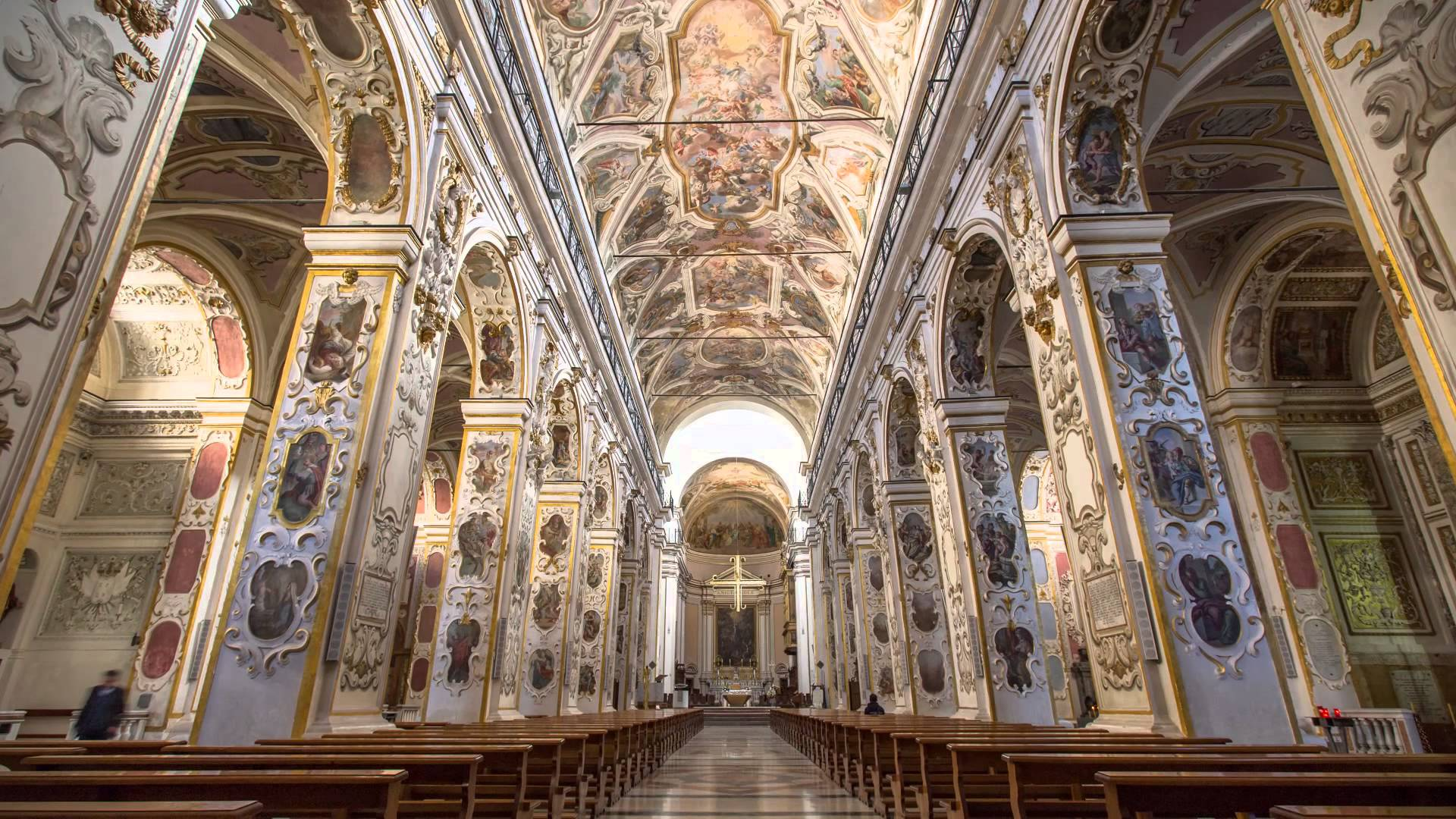 Affreschi del Borremans